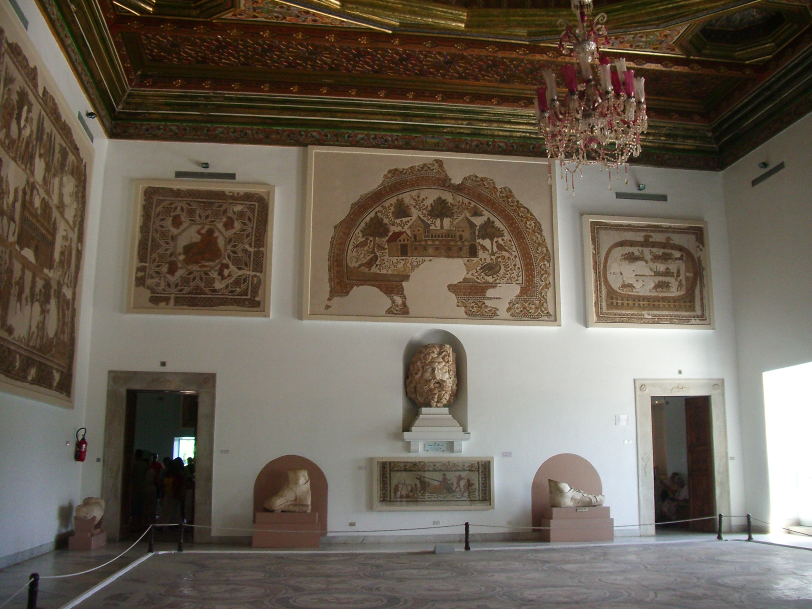 mosaics i estatues al Bardo